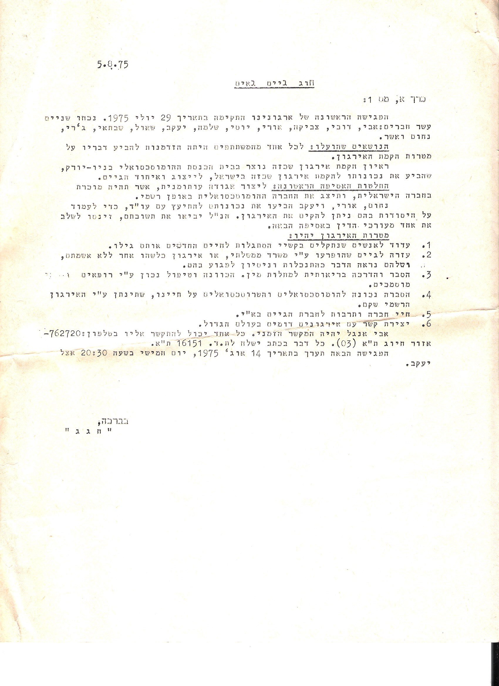 פרוטוקול הישיבה הראשונה של האגודה לשמירת זכויות הפרט